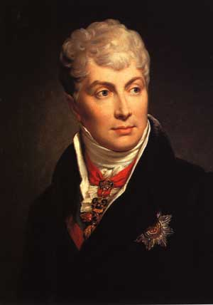 Graf Klemens von Metternich